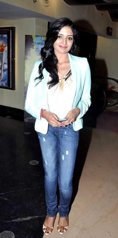 വിമല രാമൻ